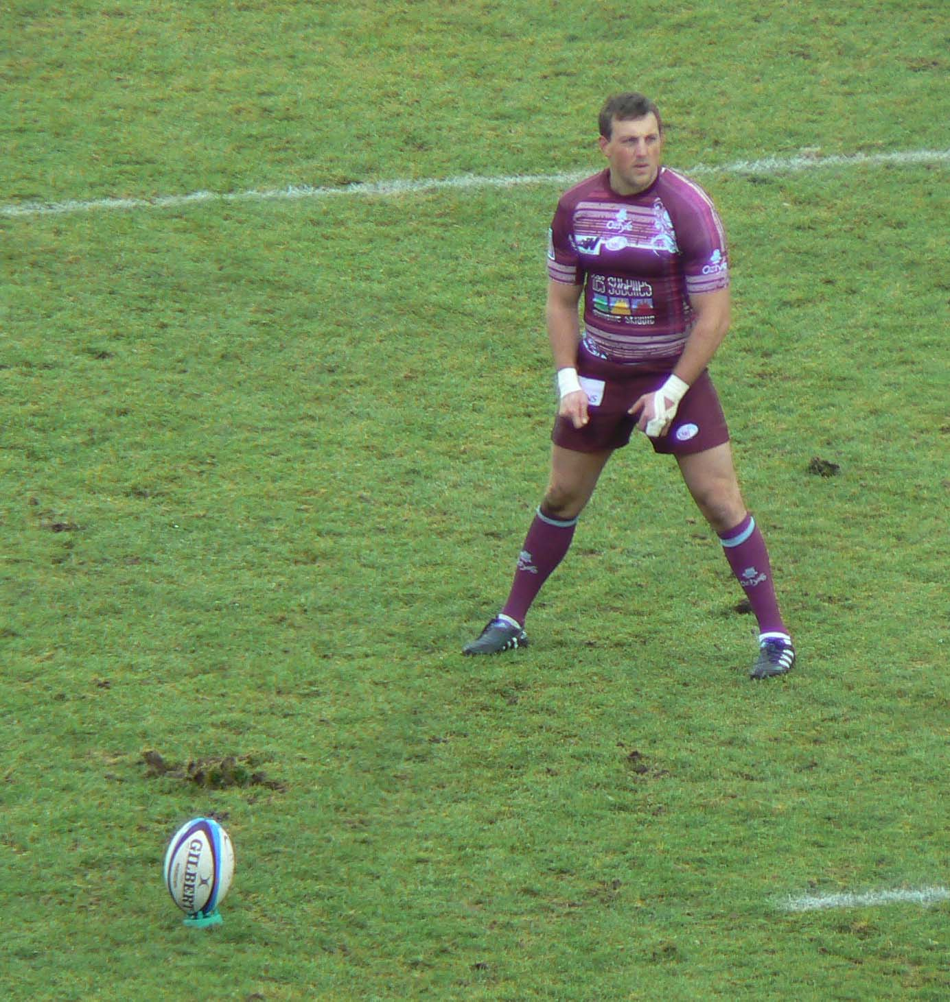 Le rugbyman argentin Alberto Di Bernardo avec le CS Bourgoin-Jallieu tente une pénalité face à l'ASM Clermont Auvergne au stade Marcel-Michelin de Clermont-Ferrand.